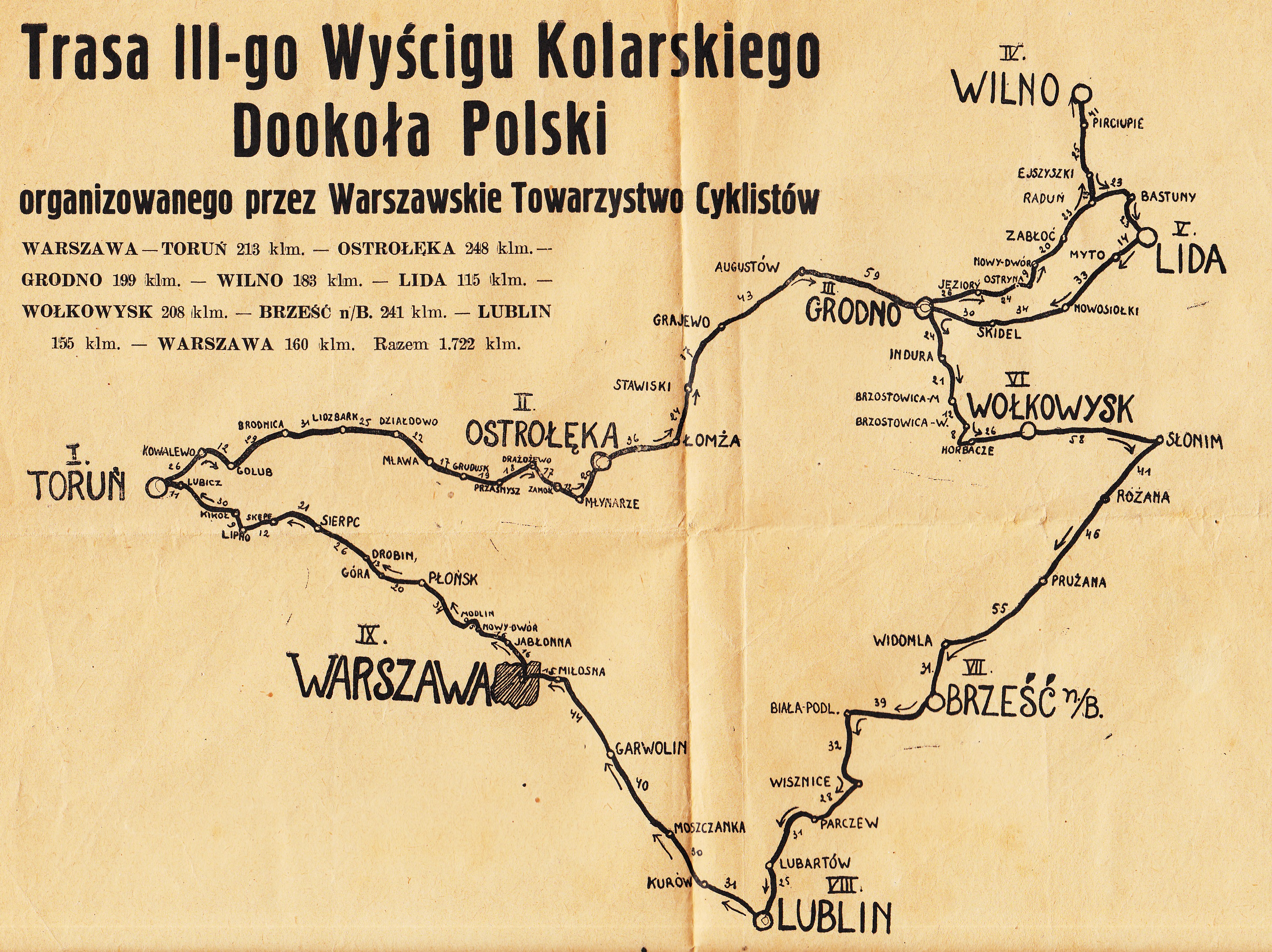 Mapa ilustrująca trasę w.w. wyścigu, pochodzi ze zbiorów Stanisława Wasilewskiego, kolarza, który brał w nim udział.